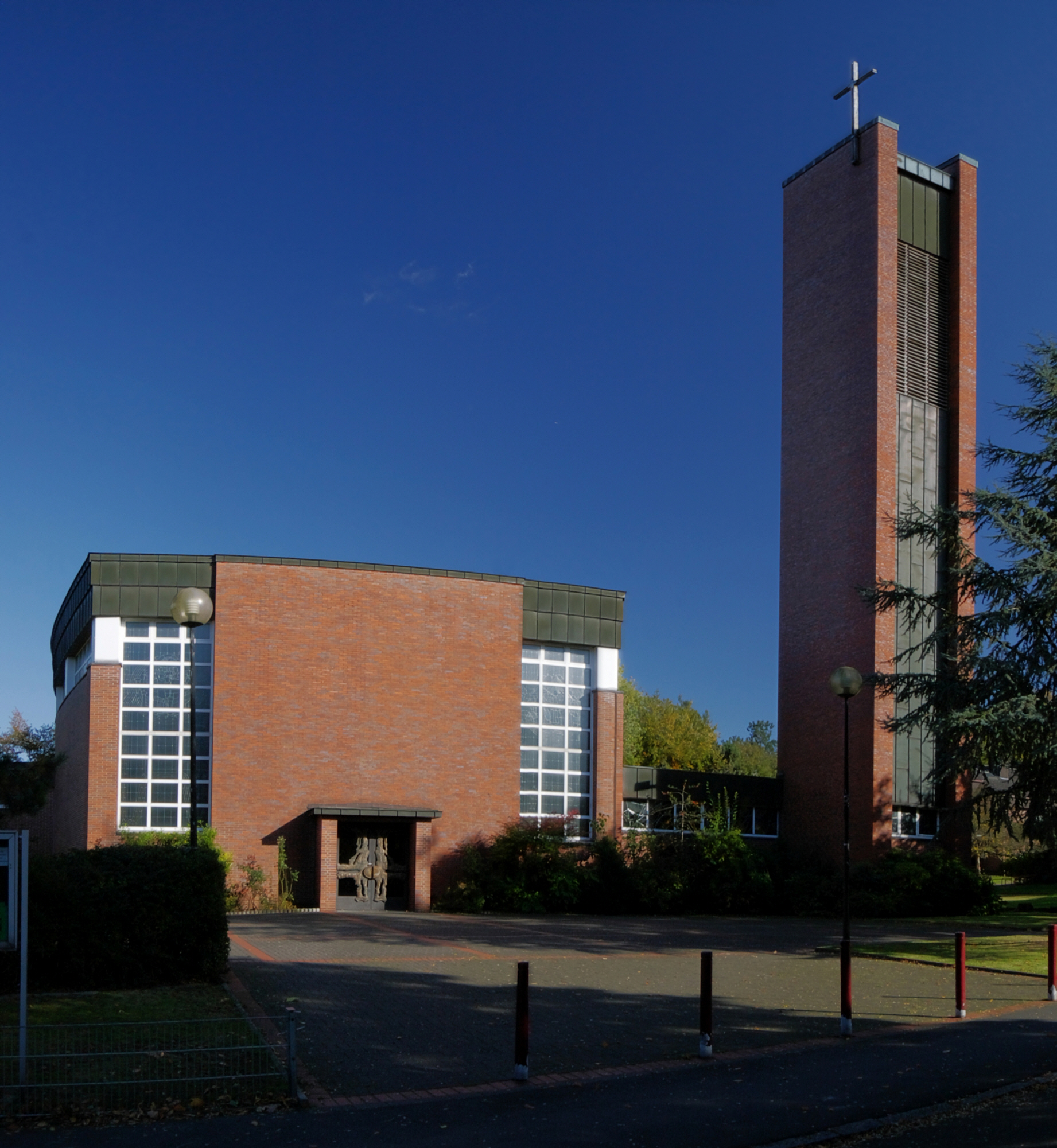 Katholische Kirche St. Nikolaus von Flüe in Dortmund-Neuasseln, Nordrhein-Westfalen, Deutschland